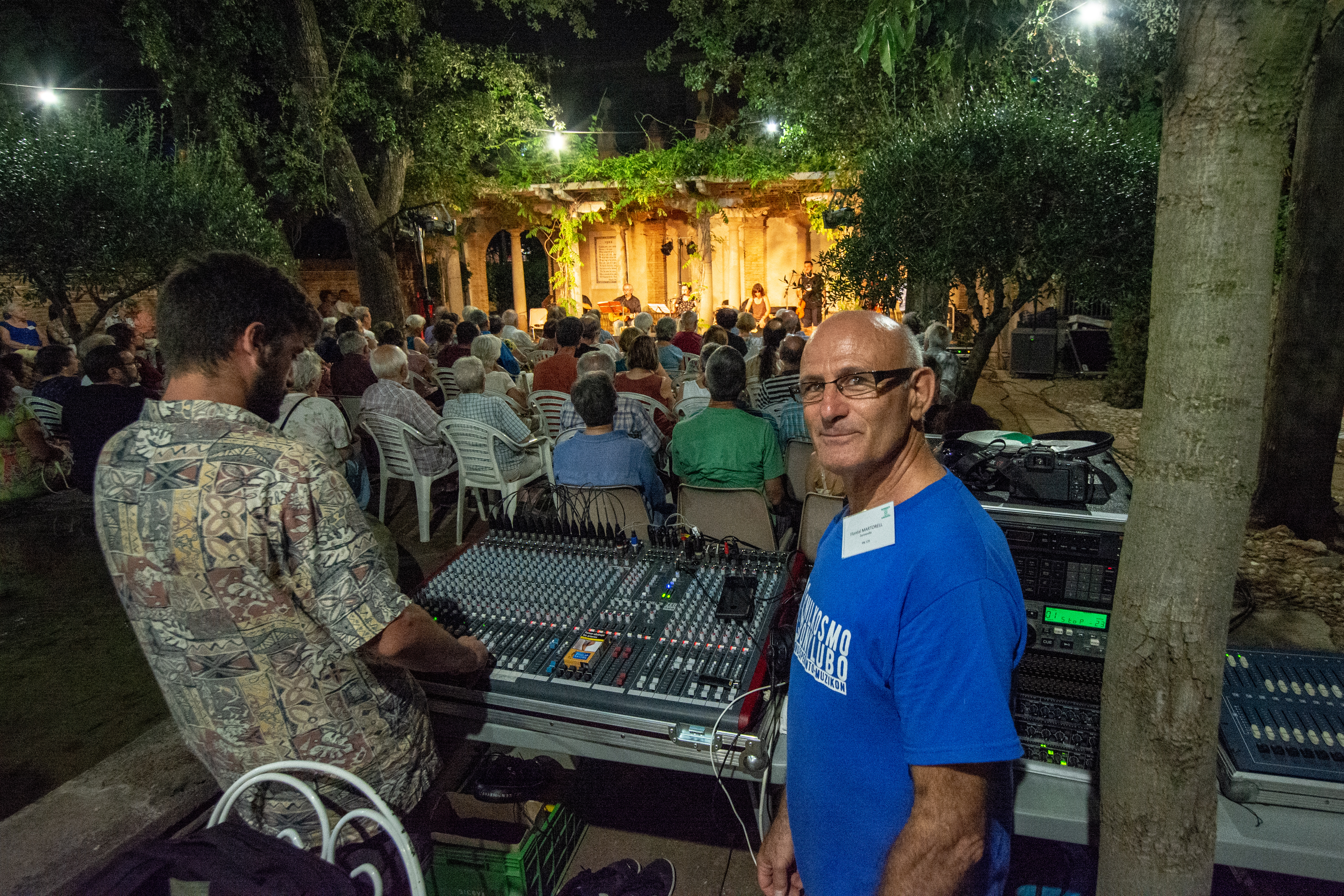 Floreal Martorell dum koncerto de Kaj Tiel Plu. SAT-Kongreso 2019, Barcelono.